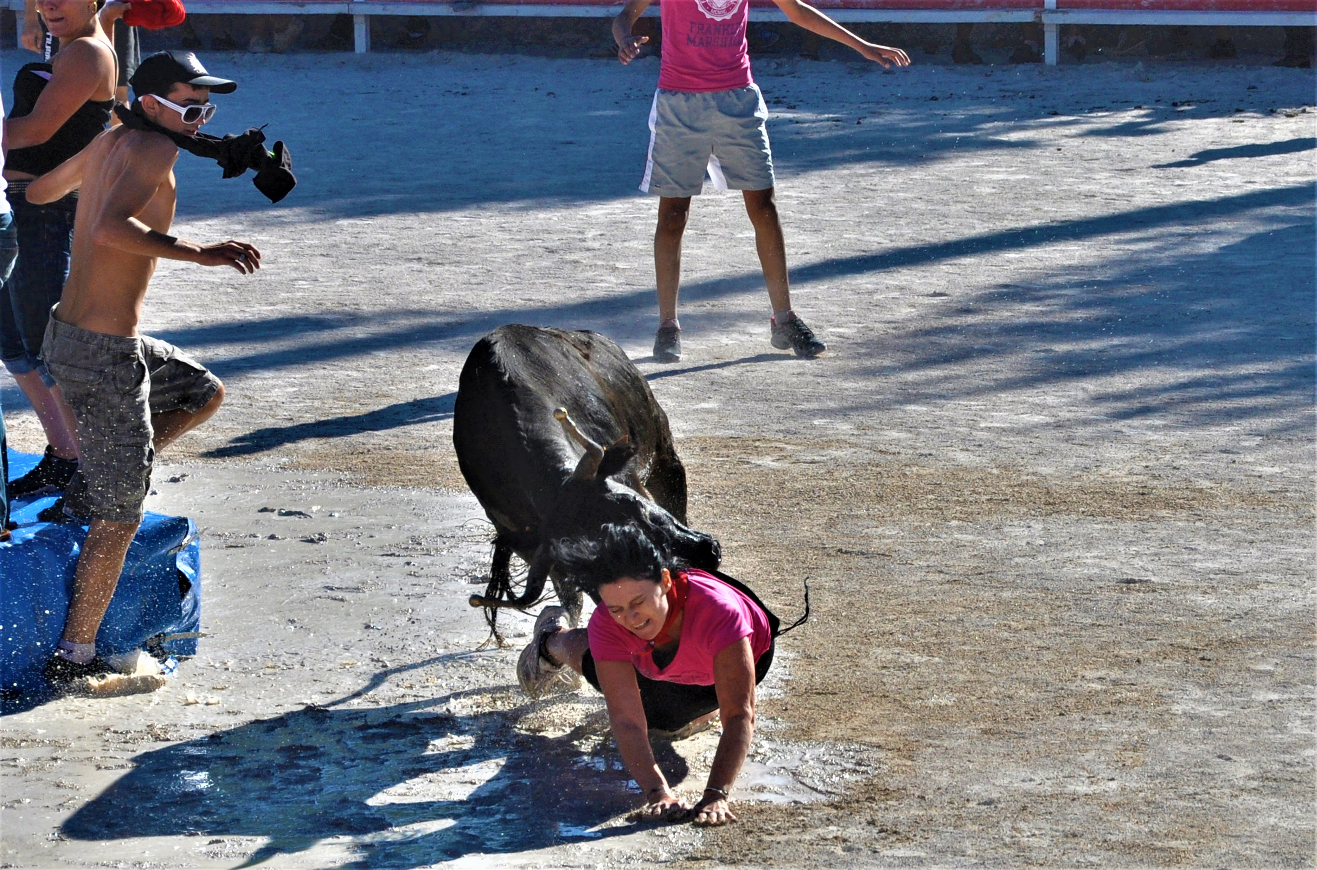 Taureau piscine